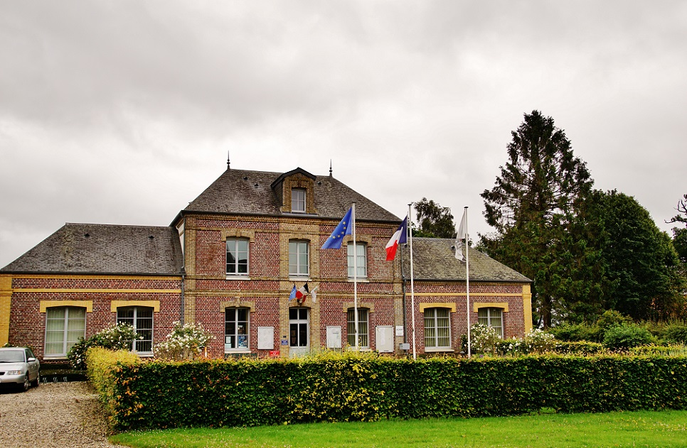 La Mairie